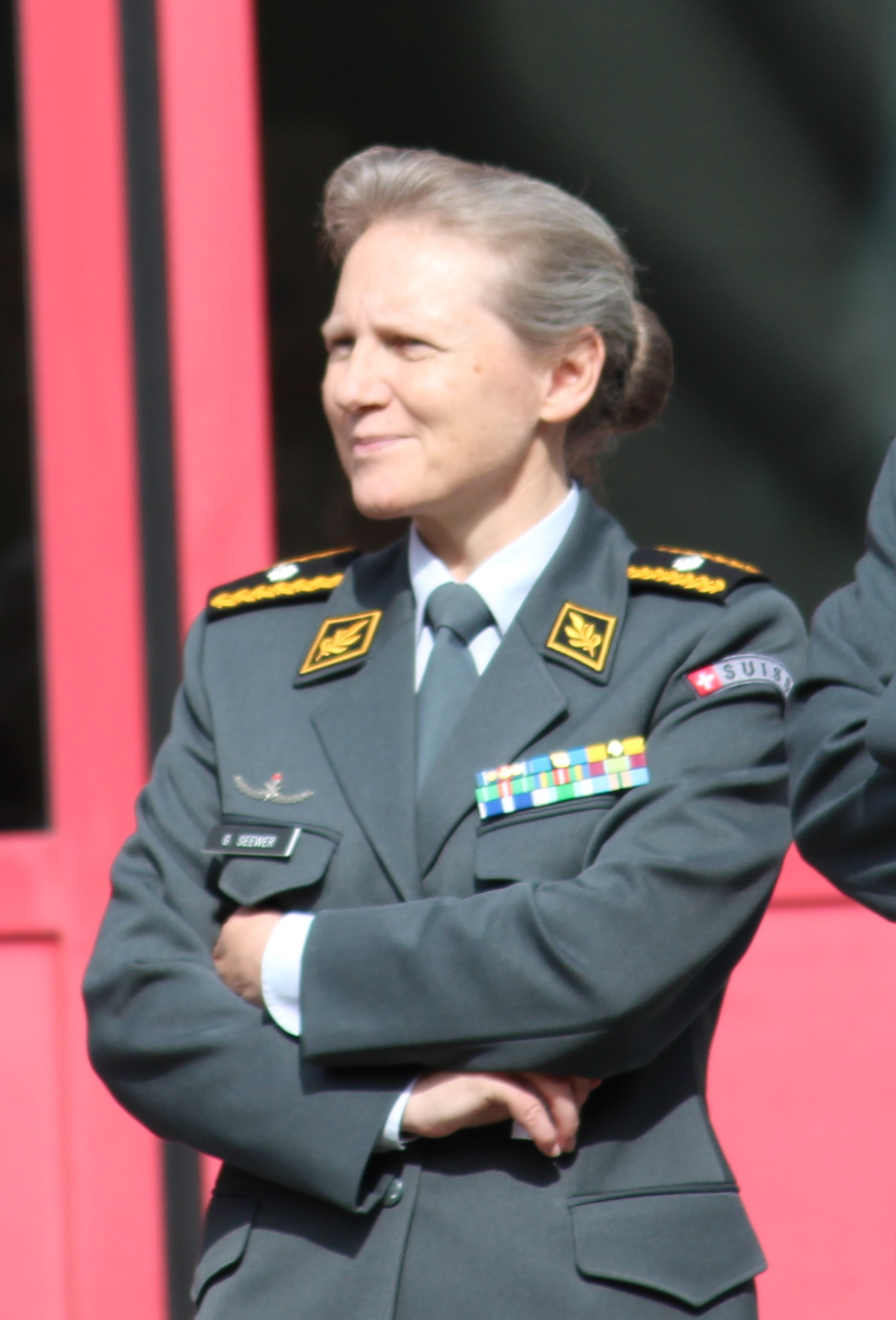 Germaine Seewer anlässlich des Jubiläums 75 Jahre Militärflugplatz Alpnach